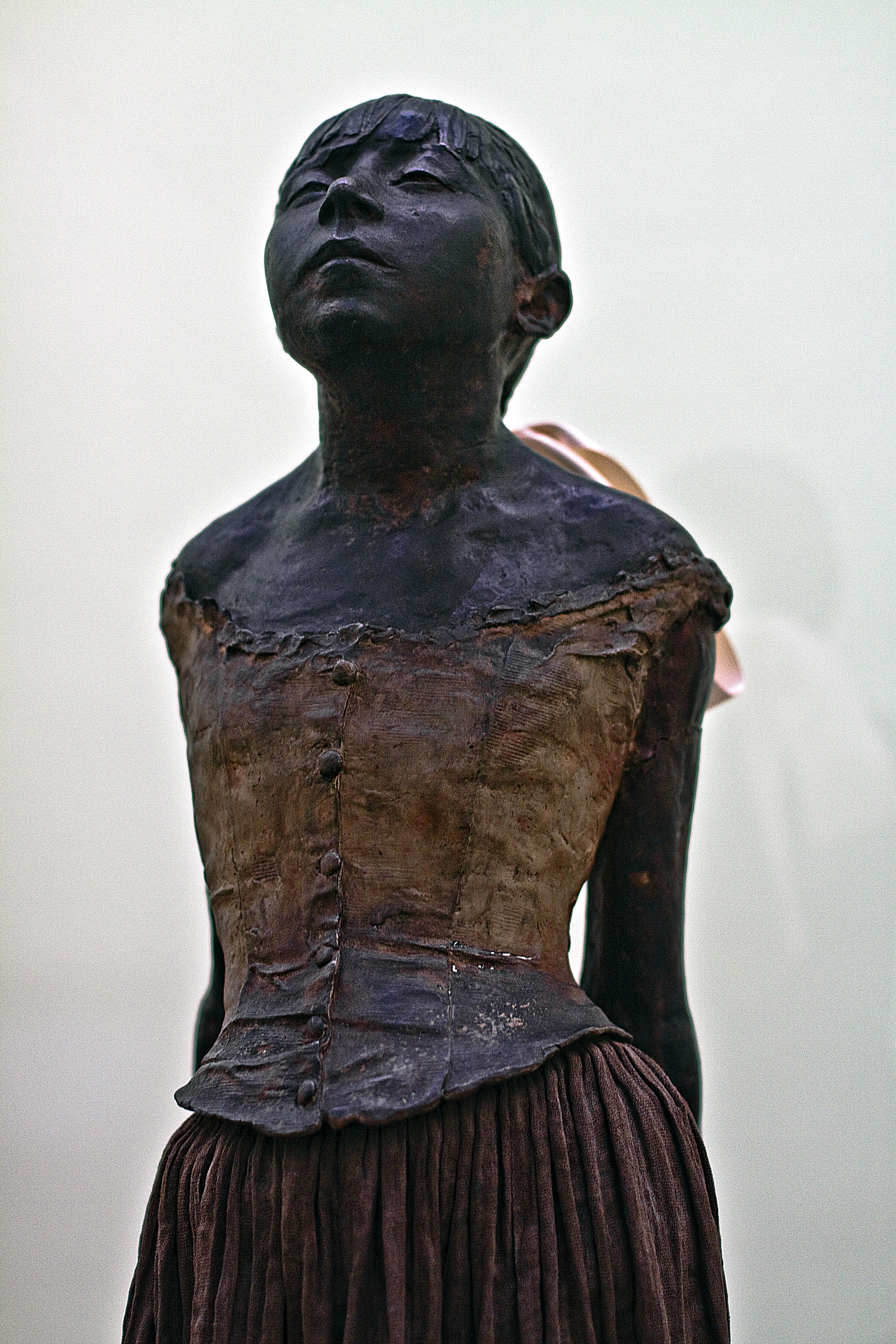 Danseresje, Degas